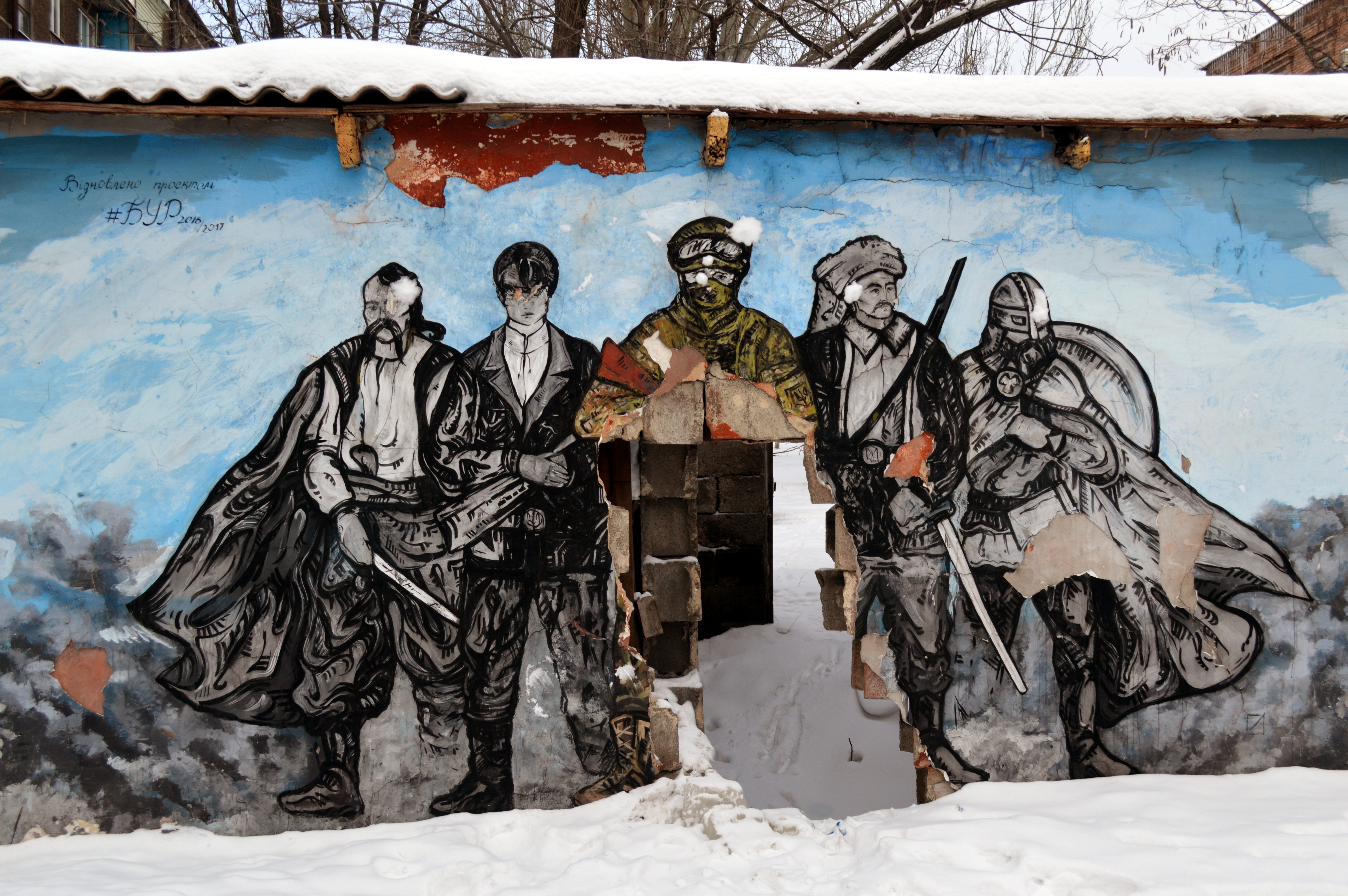 Маріуполь у снігу. 9 січня 2019.